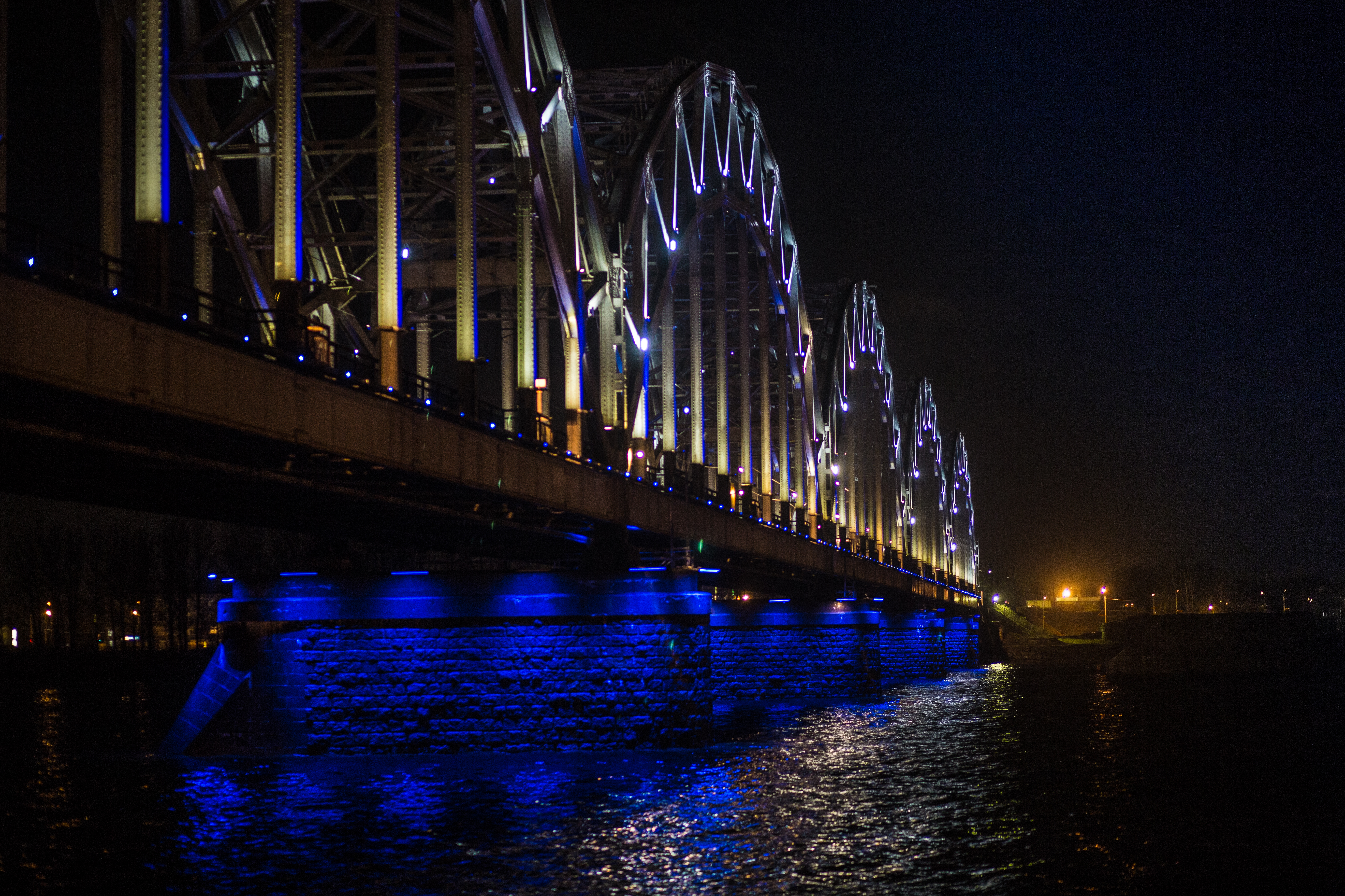 Железнодорожный мост в Риге (Dzelzceļa tilts), вид ночью при работе иллюминации